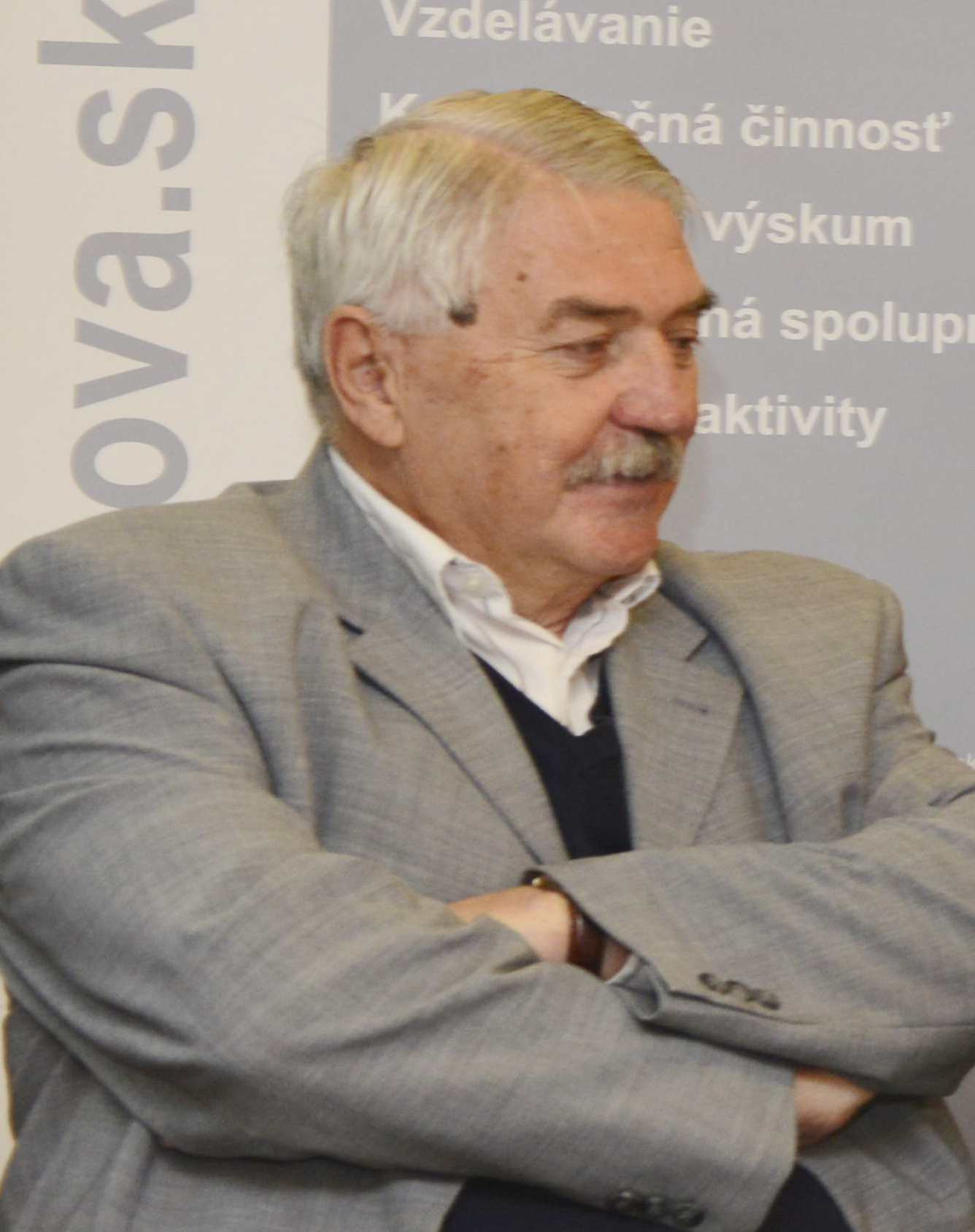 Dušan Kováč